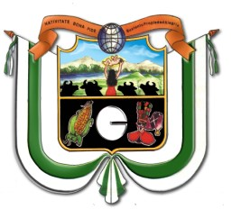 Escudo municipal de Galapa